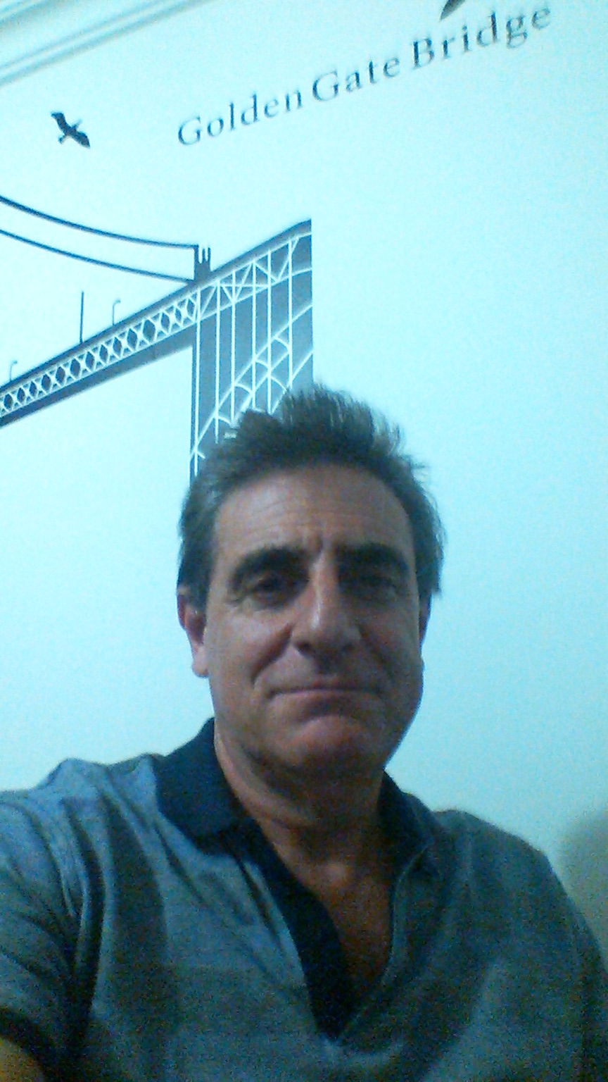 Fotografía de Andrés Vicente